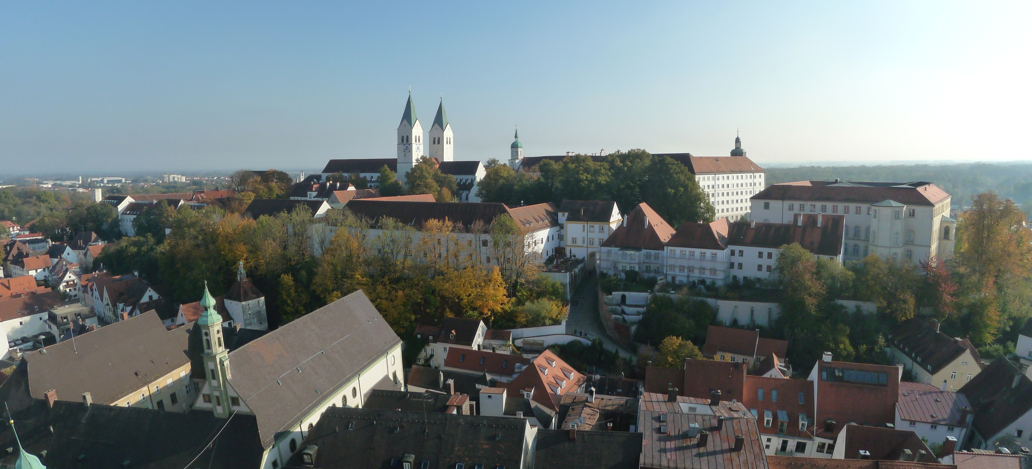 Blick auf den Domberg vom Turm von St. Georg aus